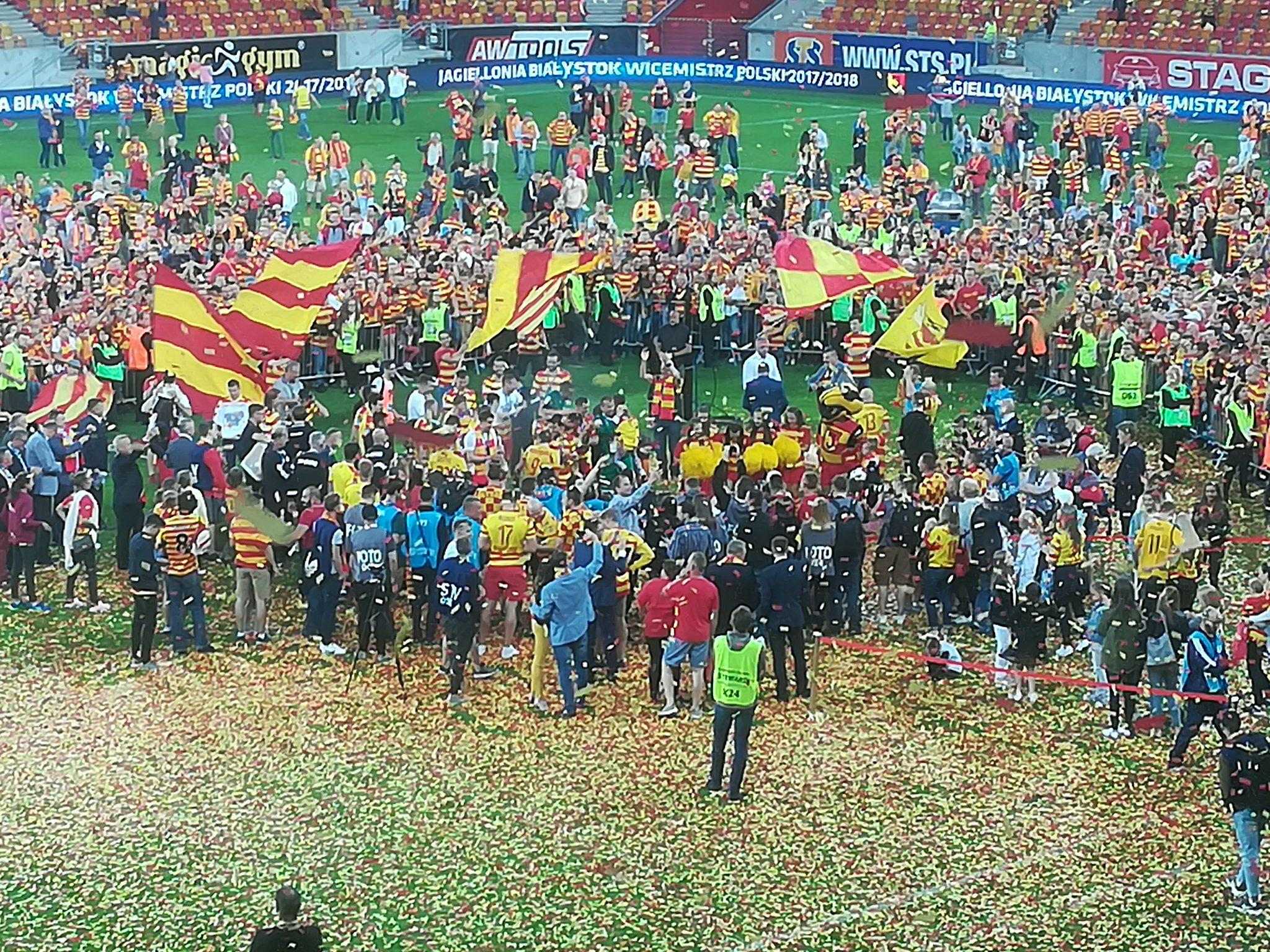 Feta wicemistrzostwo Polski